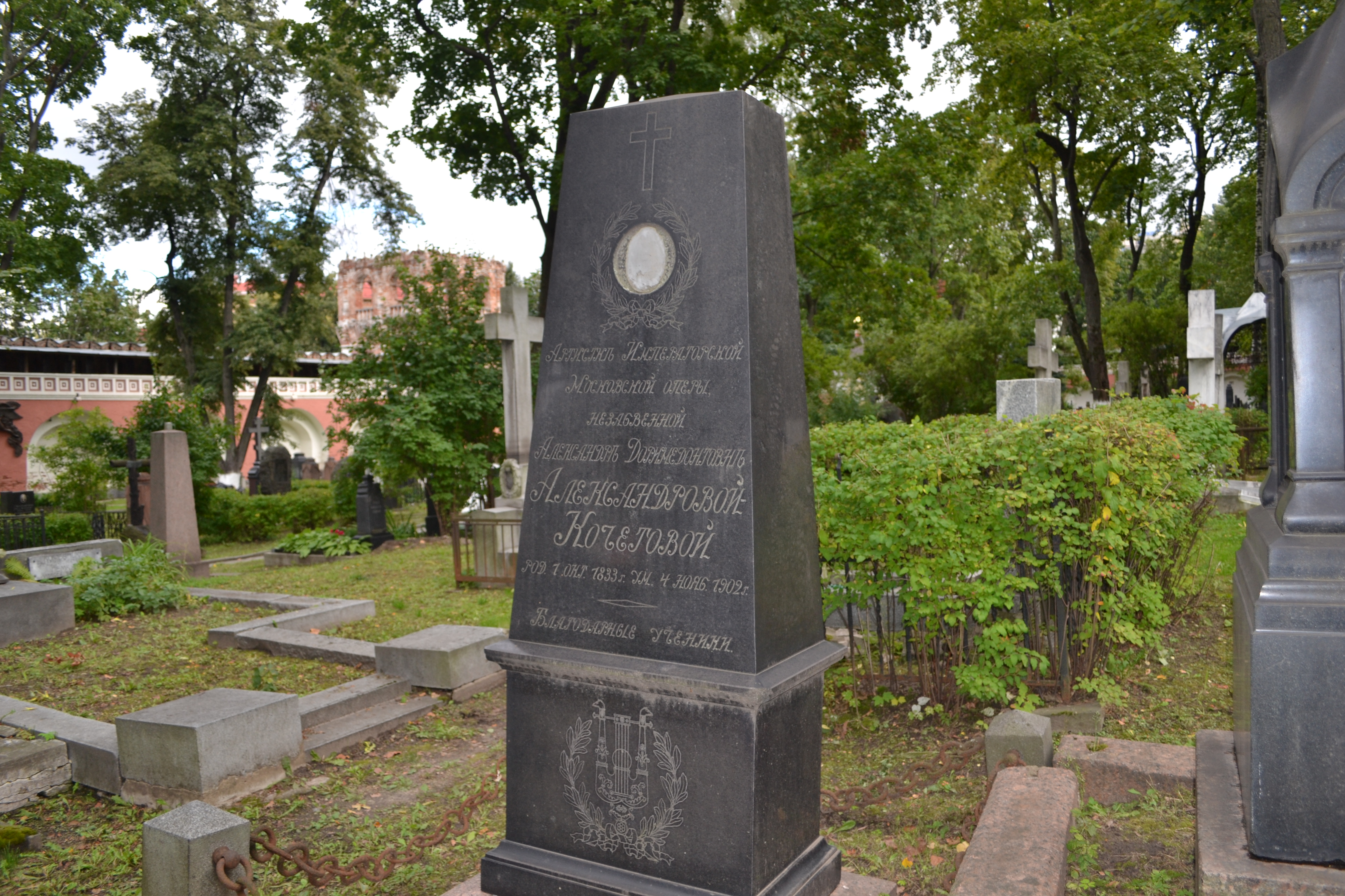 Могила в некрополе Донского монастыря